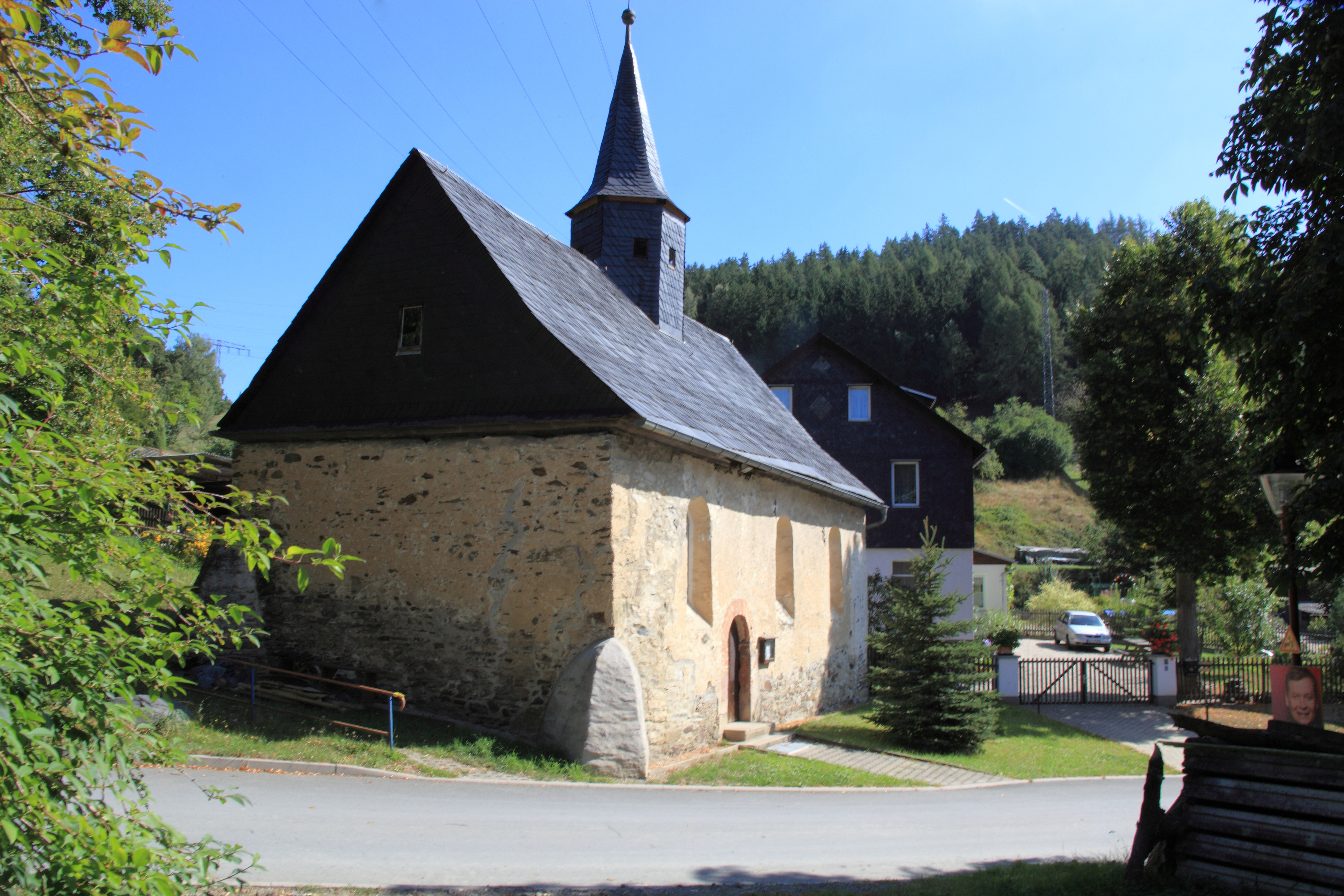 Dorfkirche in Döhlen, Gemeinde Probstzella, Thüringen